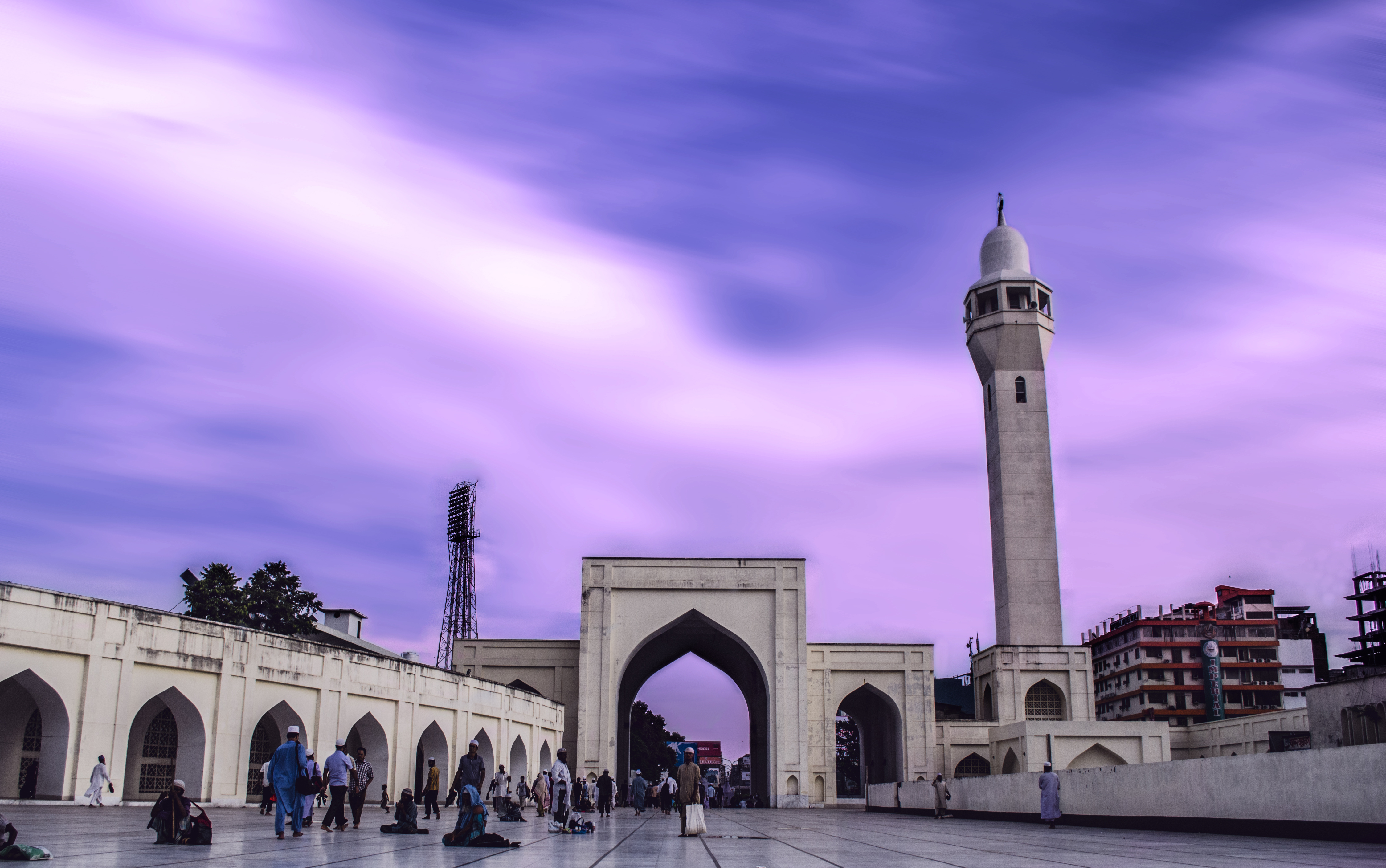 বায়তুল মোকাররম